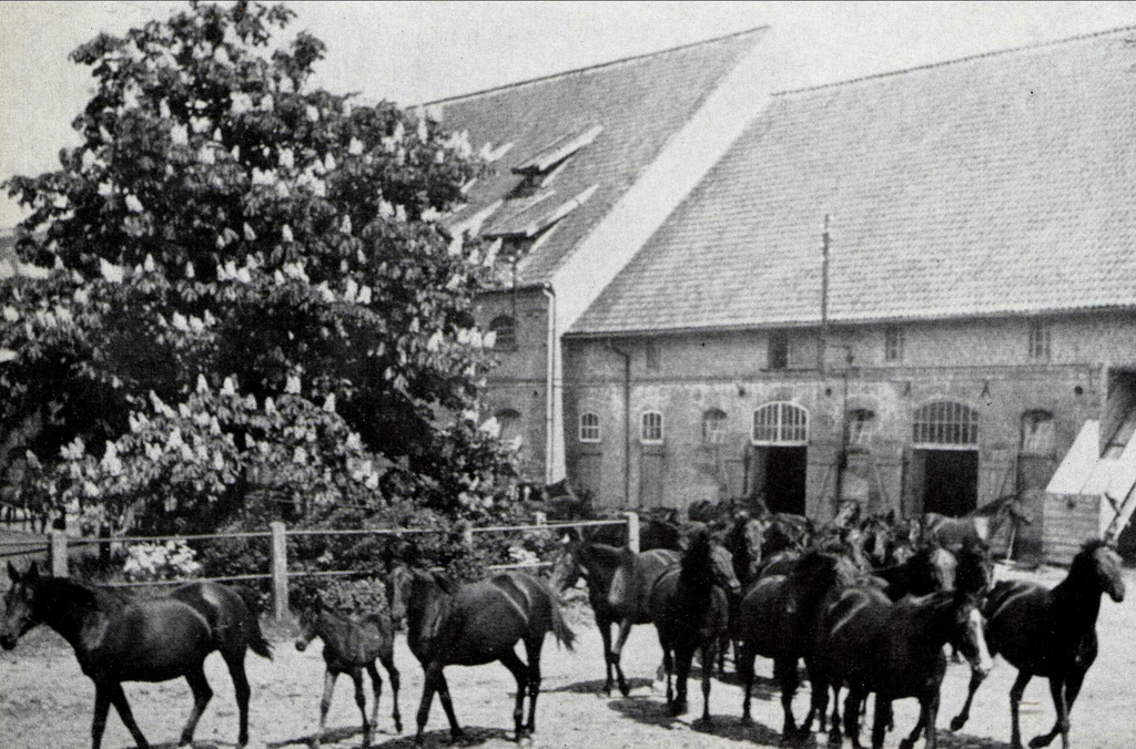 Das Gestüt in Trakehnen